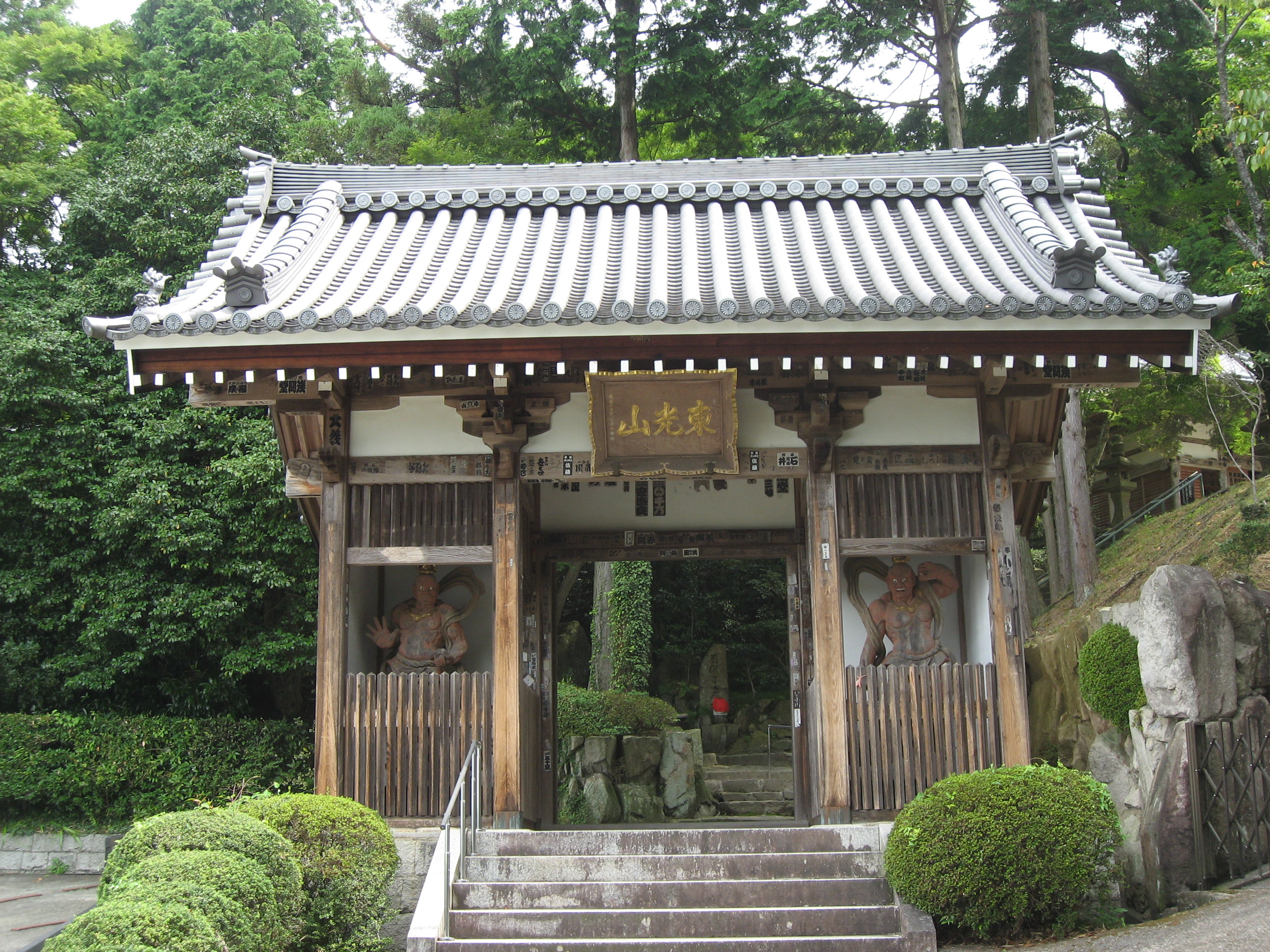 Bodai-ji Tenple, Sanda, Hyogo, Japan